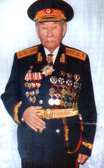 Монгол: 100 насны ойд